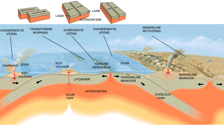 Vulkanism ja laamtektoonika